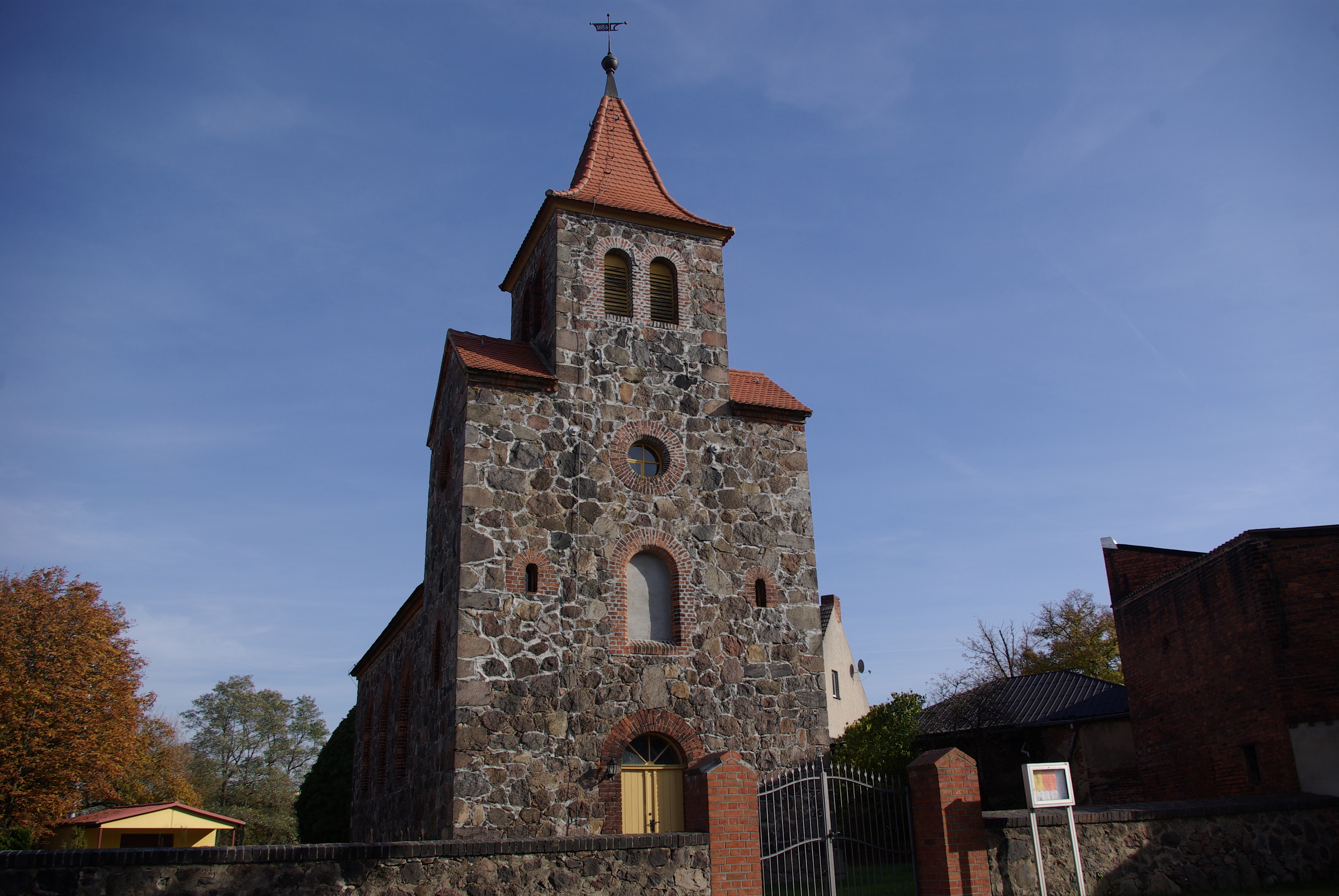 Niedergörsdorf, Ortsteil Schönefeld in Brandenburg. die Kirche in Schönefeld steht unter Denkmalschutz. Erbaut wurde die Kirche im Jahr 1853.